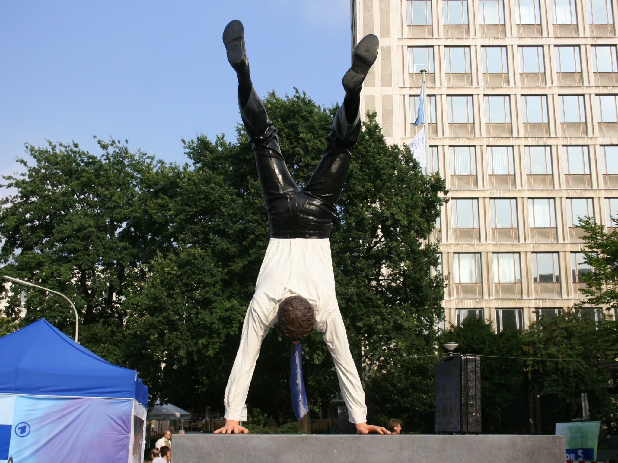 Ein neuer erfolgreicher Tag, Skulptur in Wuppertal-Elberfeld